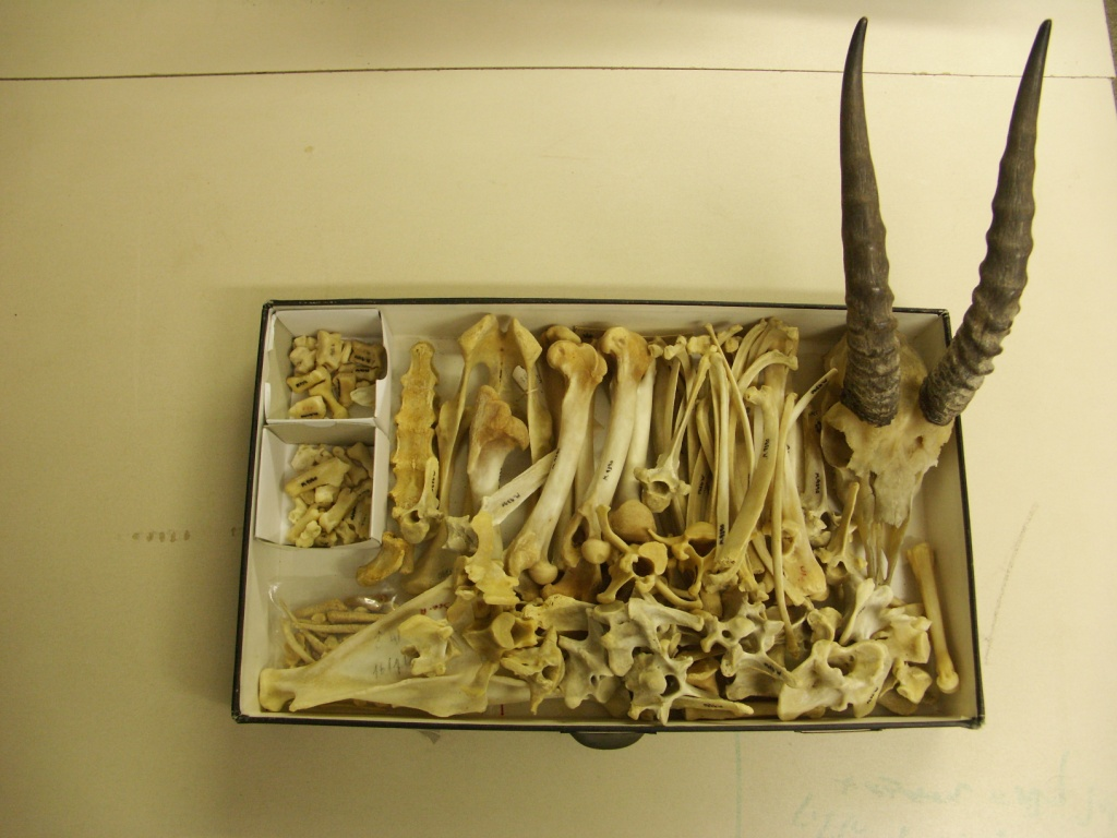 Archaeozoology עצמות בעלי חיים שנמצא בחפירה ארכאולוגית פרהיסטורית שלד צבי באוסף המשווה של המעבדה לארכאוזואולוגיה באוניברסיטת חיפה